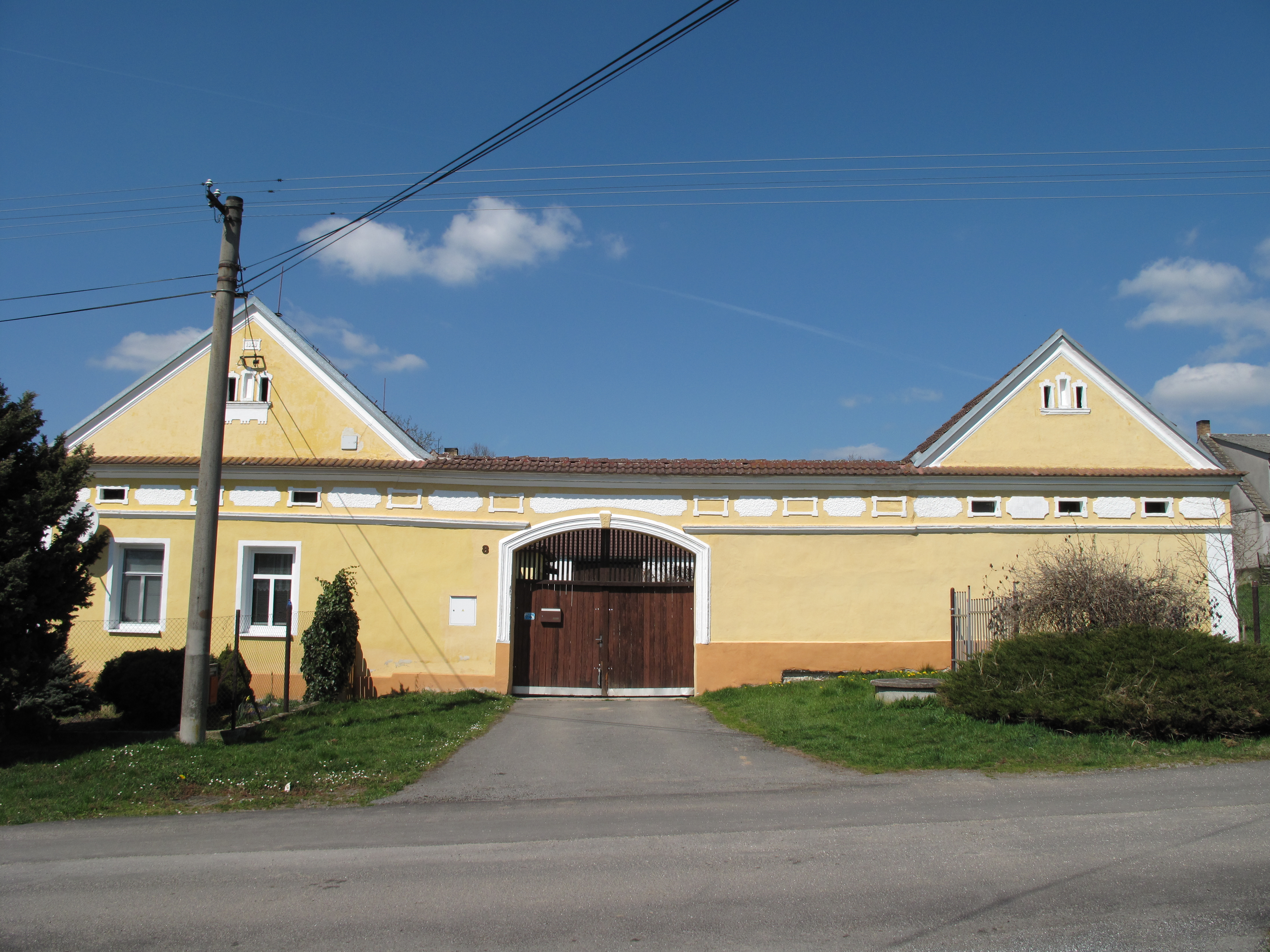 Statek v Přežánkách. Okres České Budějovice, Česká republika.